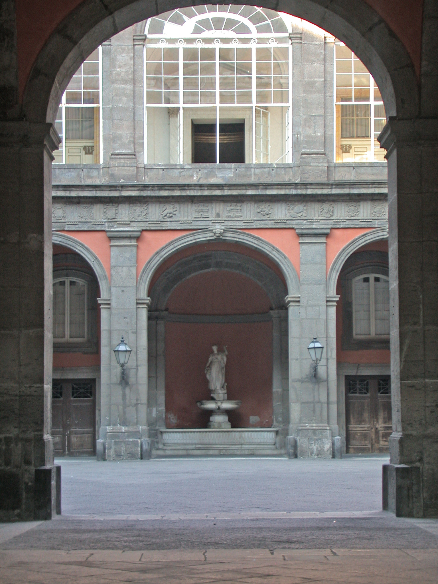 Italia, regione Campania, Napoli, Palazzo Reale, vista del cortile interno dall'ingresso su piazza del Plebiscito